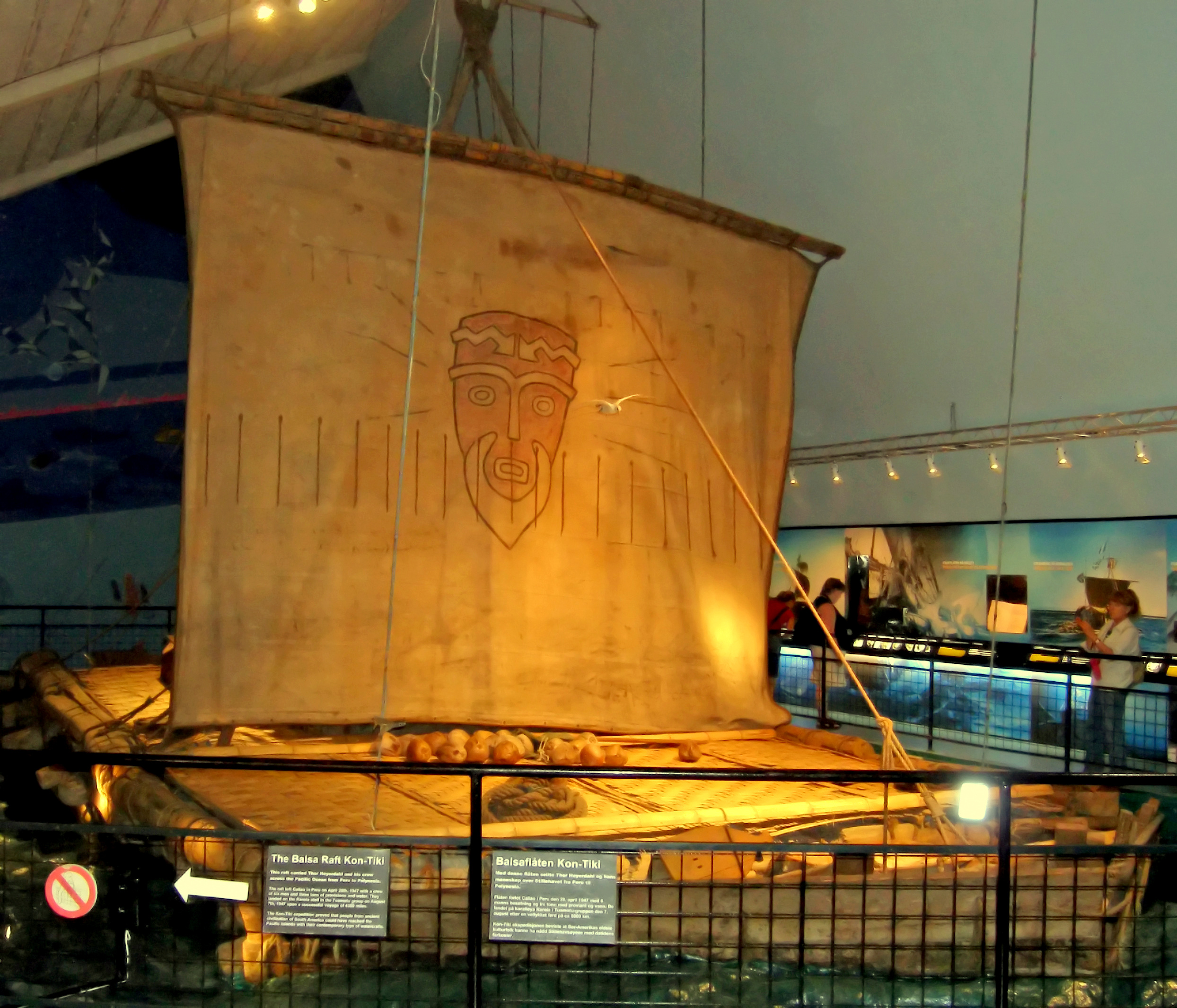 The Kon-Tiki raft (Kon-Tiki Museum, Oslo, Norway)